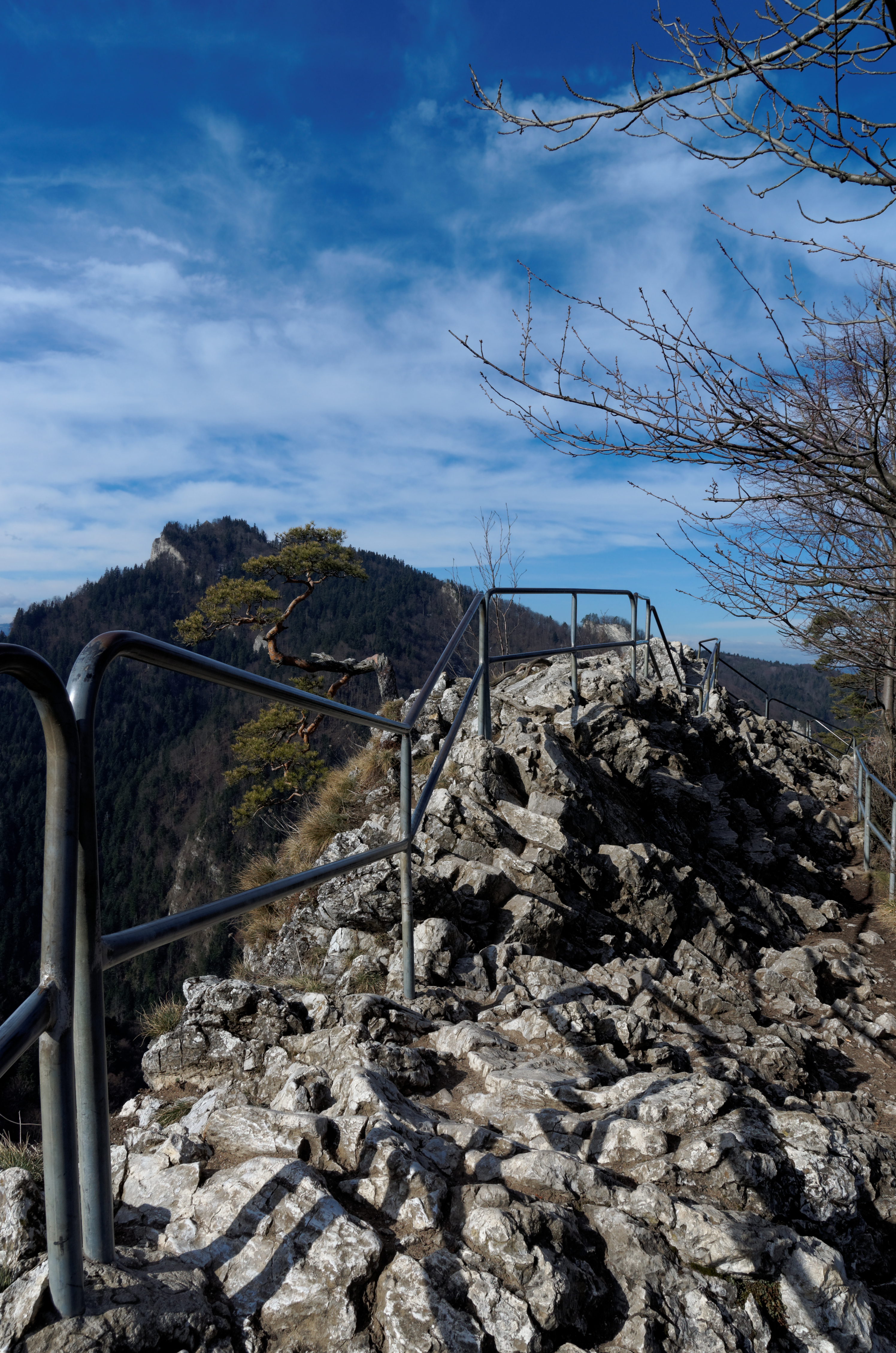 Szczyt Sokolicy w Pieninach